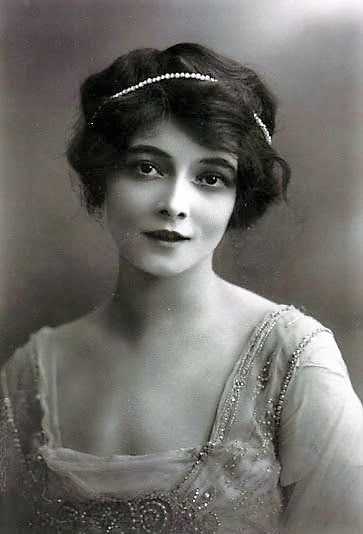 Marie Doro